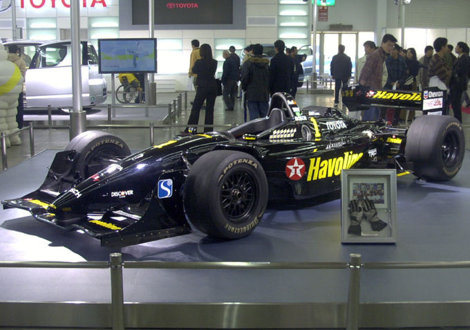 TOYOTA CART,Mazda Museum.